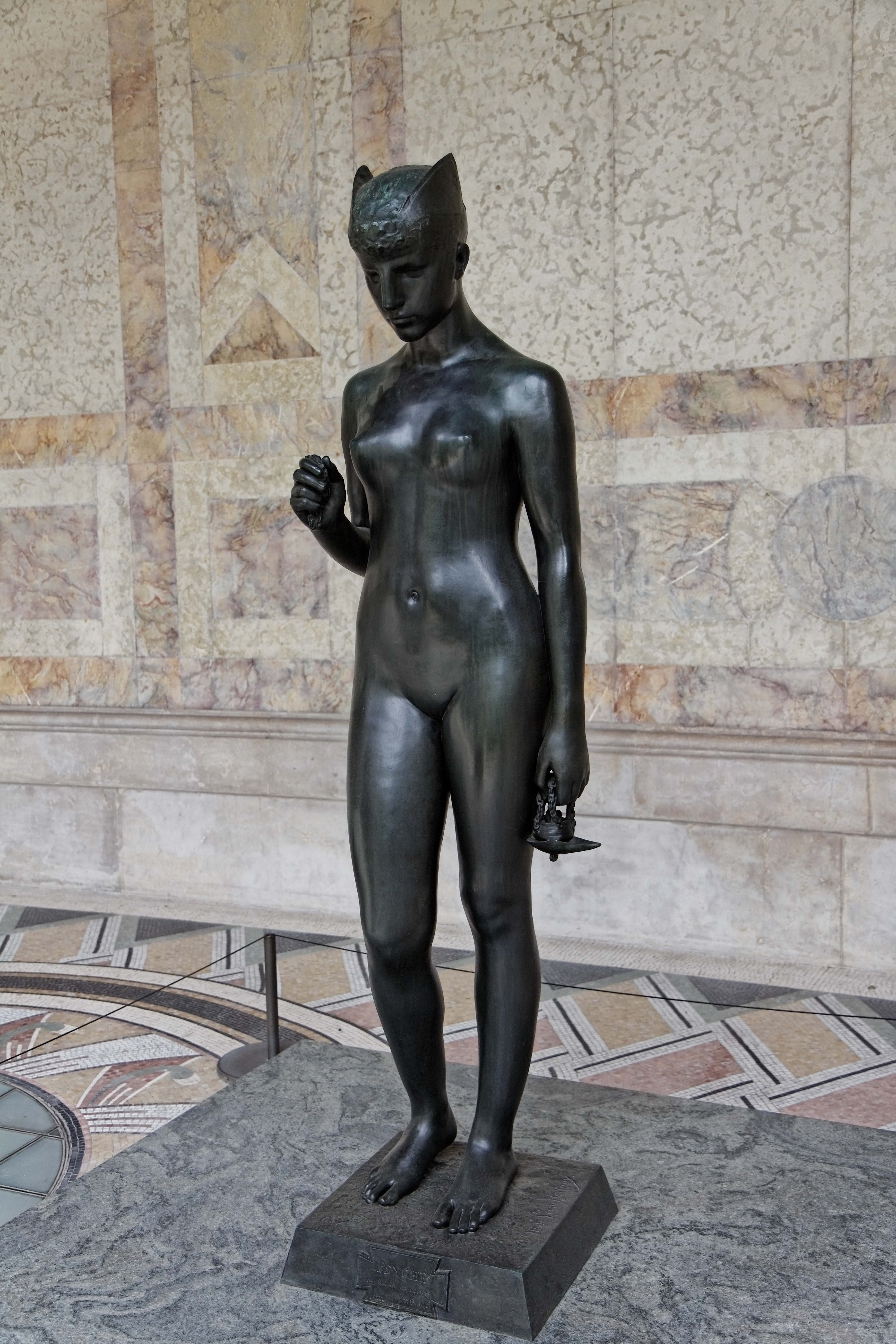 Hélène Bertaux, Psyché sous l'empire du mystère, bronze, Paris, Petit Palais. Cette œuvre vaudra à Hélène Bertaux une médaille d'or de première classe lors de l'Exposition universelle de 1889.